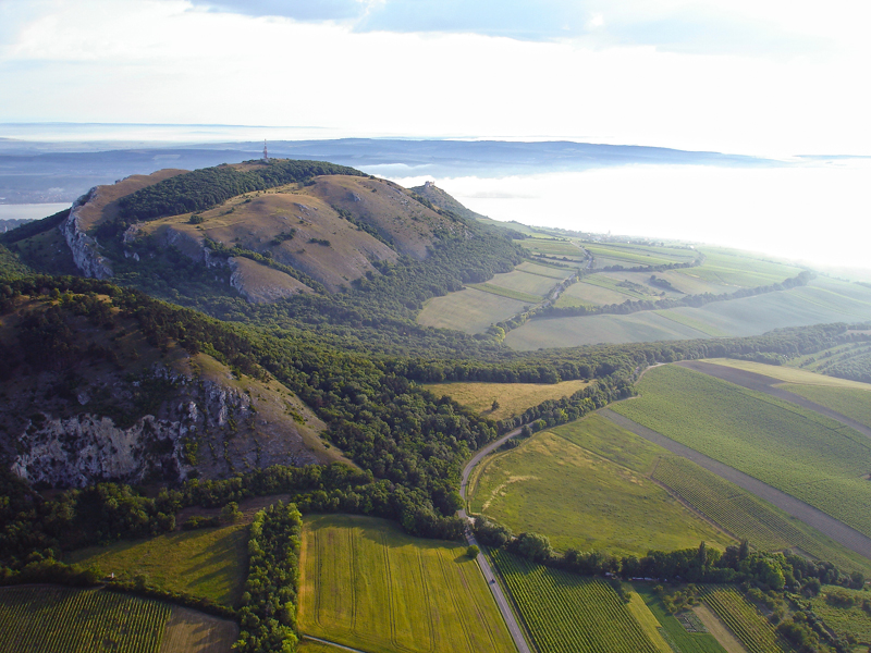 Pálava naturreservat, södra Mähren, Tjeckien, flygfoto